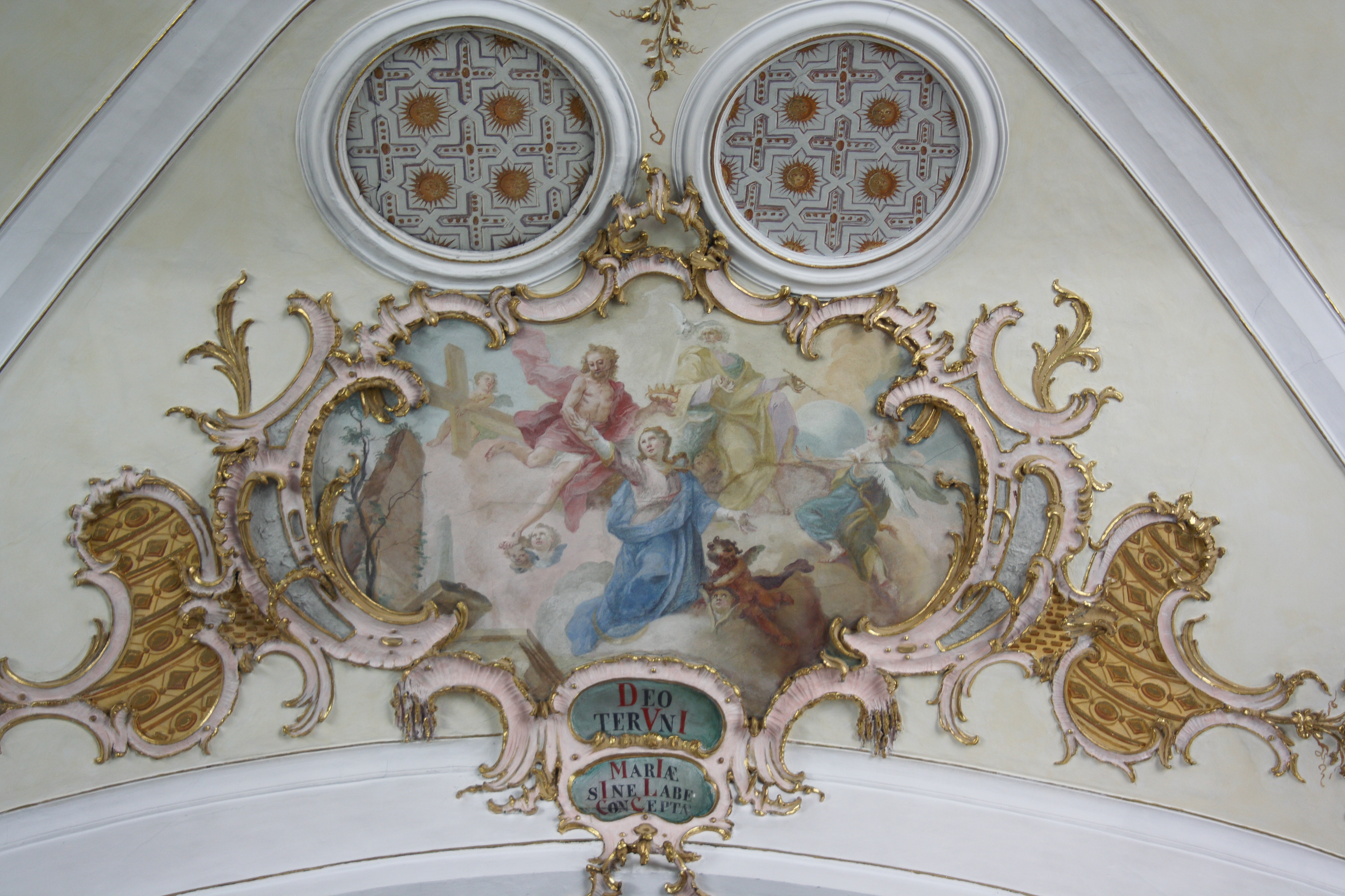 Katholische Pfarrkirche Maria Immaculata in Schwennenbach, einem Stadtteil von Höchstädt an der Donau im Landkreis Dillingen an der Donau (Bayern), Deckenmalerei von Johann Anwander von 1758, Darstellung: Krönung Mariens; Stuckkartusche mit Chronogramm MDCCLVIII (1758)